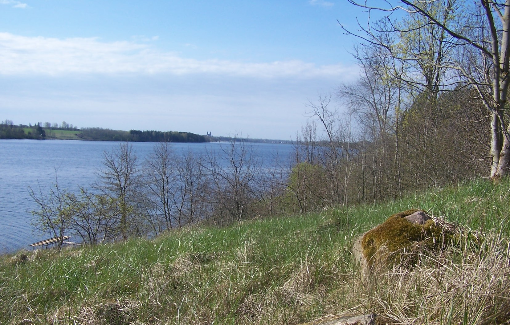 Drūlėnų pilkapis